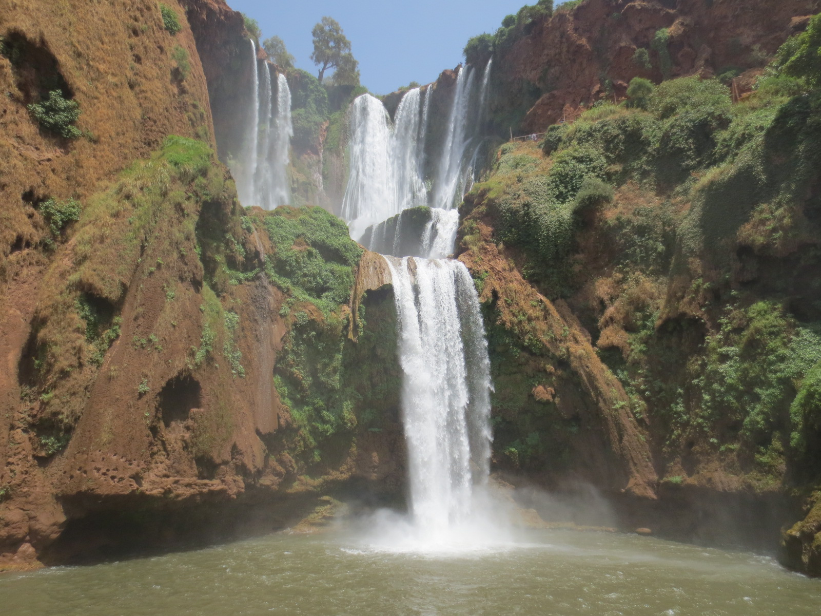 Ouzoud Falls